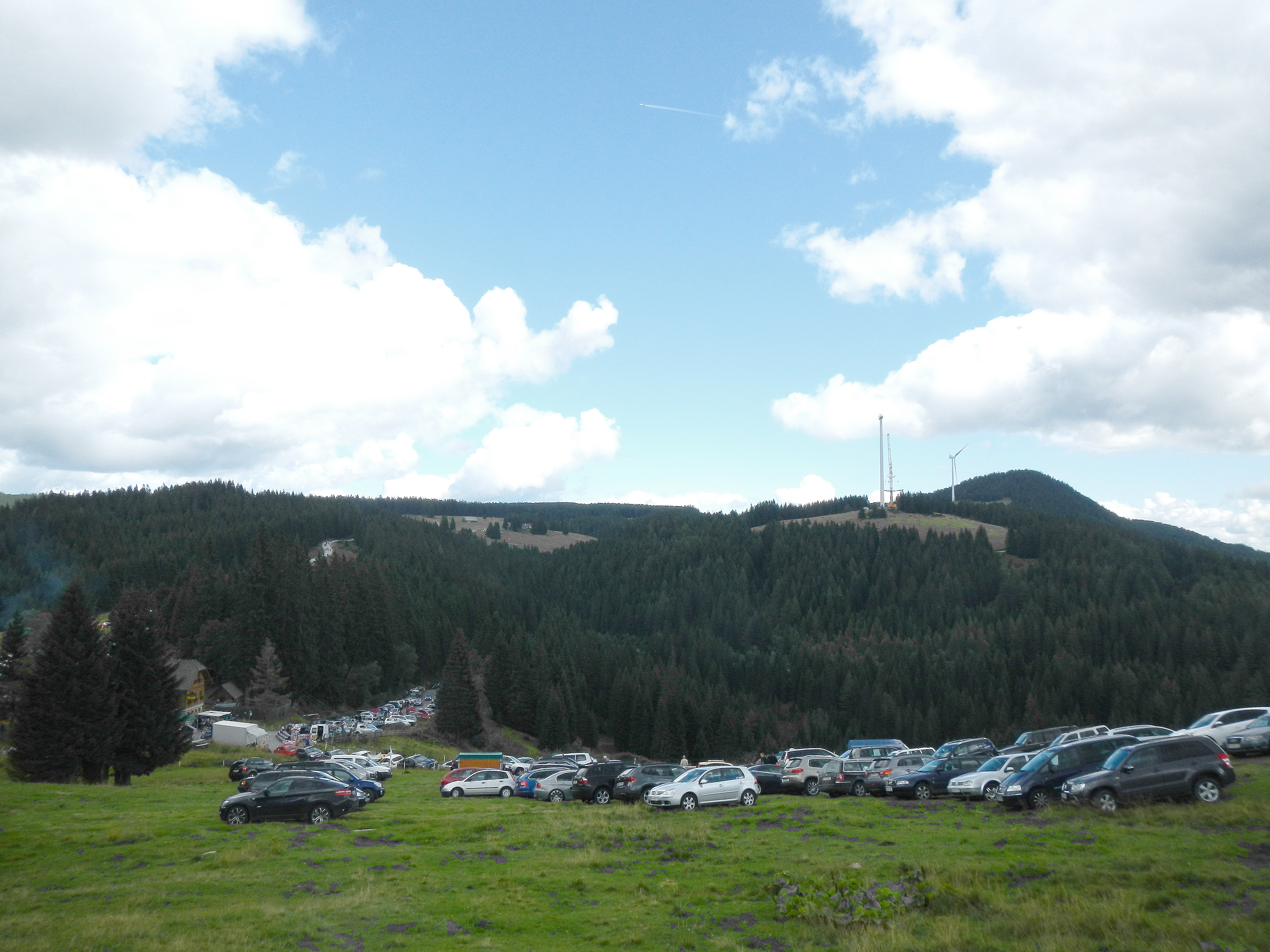 Auf dem Blochriegel in der Freiländer Alm im Hebalmgebiet (Hintergrund): Windräder des Windparks Freiländer Alm. Im Vordergrund wird dieser Teil des Almgebiets (die Stocker Alm) als Parkplatz für die Besucher des Hebalmkirtags verwendet